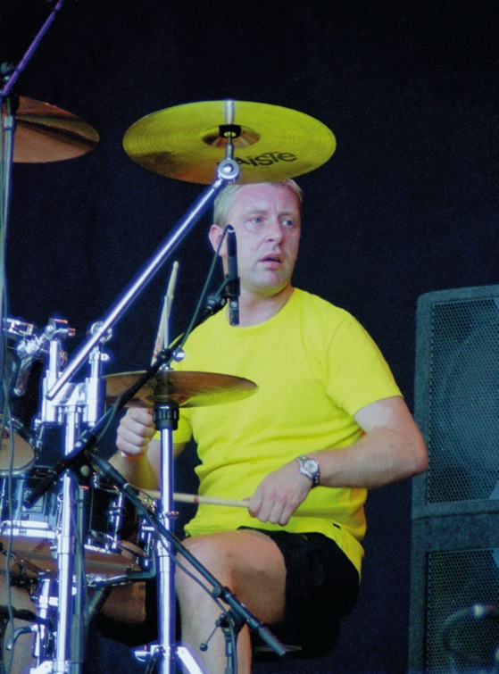 met dank aan de slagwerkkrant. Foto Chris Gotte door Slagwerkkrant-fotograaf Dennis Boxem, gepubliceerd in Slagwerkkrant 103 (mei-juni 2001). Met toestemming fotograaf ter beschikking gesteld.